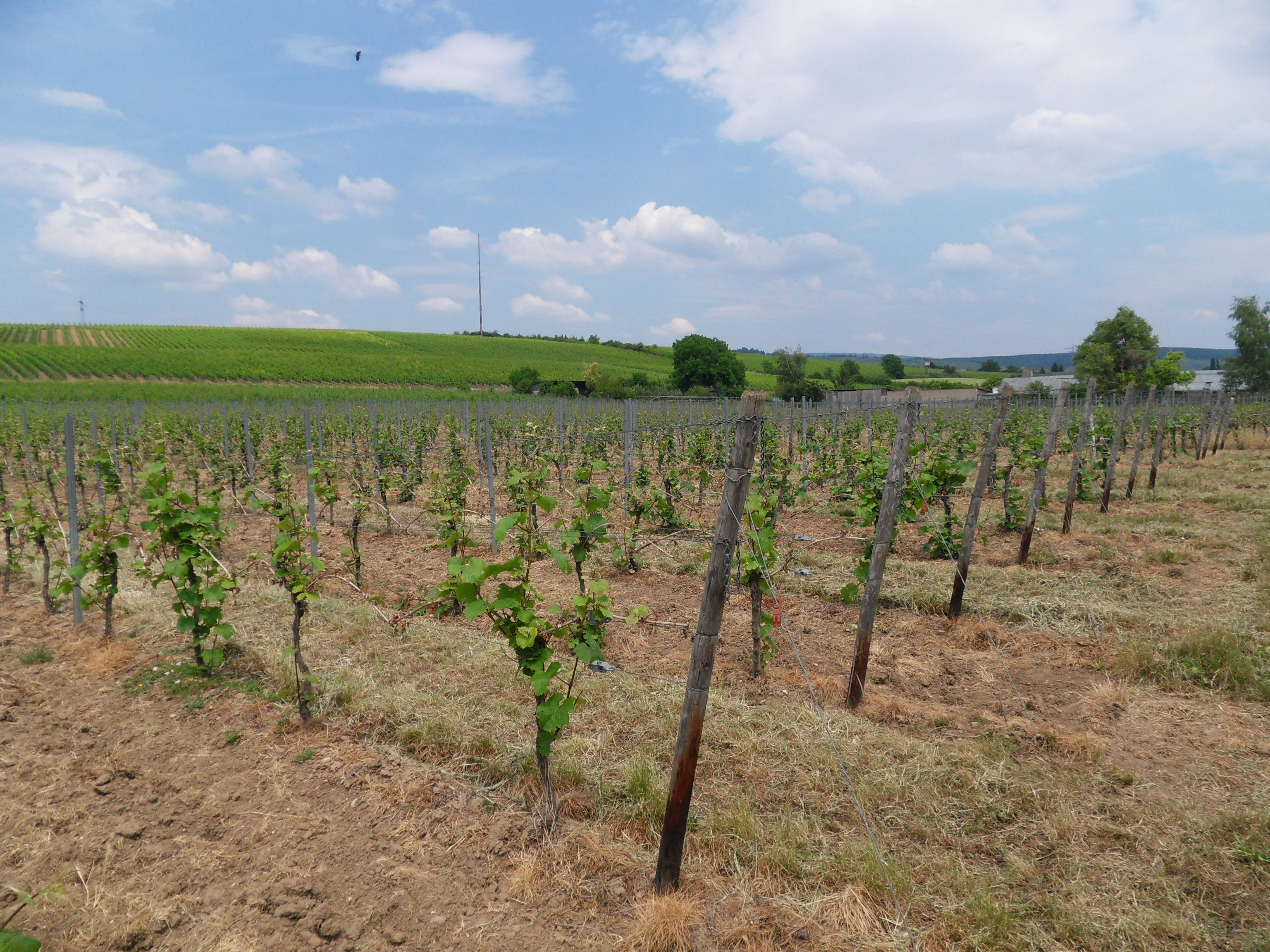 Zustand von Weinreben einen Monat nach den Nachtfrösten vom 4. Mai 2011 im Erbacher Steinmorgen. An dem zweijährigen Holz der Bogreben ist nur wenig Laub zu sehen, da dieses nach dem Frost neu austreiben musste. Nicht alle „Augen“ der Bogreben sind neu ausgetrieben. Bei ungestörter Vegetationsentwicklung wären die Bogreben schon vom Laub verdeckt. Gut zu sehen ist, dass nur der ebene Teil der Rebflächen schwach begrünt ist. Der dahinter ansteigende Weinberg – die Einzellage Steinmorgen reicht bis zur halben Höhe des Berges – wurde nicht vom Frost geschädigt und die Begrünung ist dort viel intensiver.